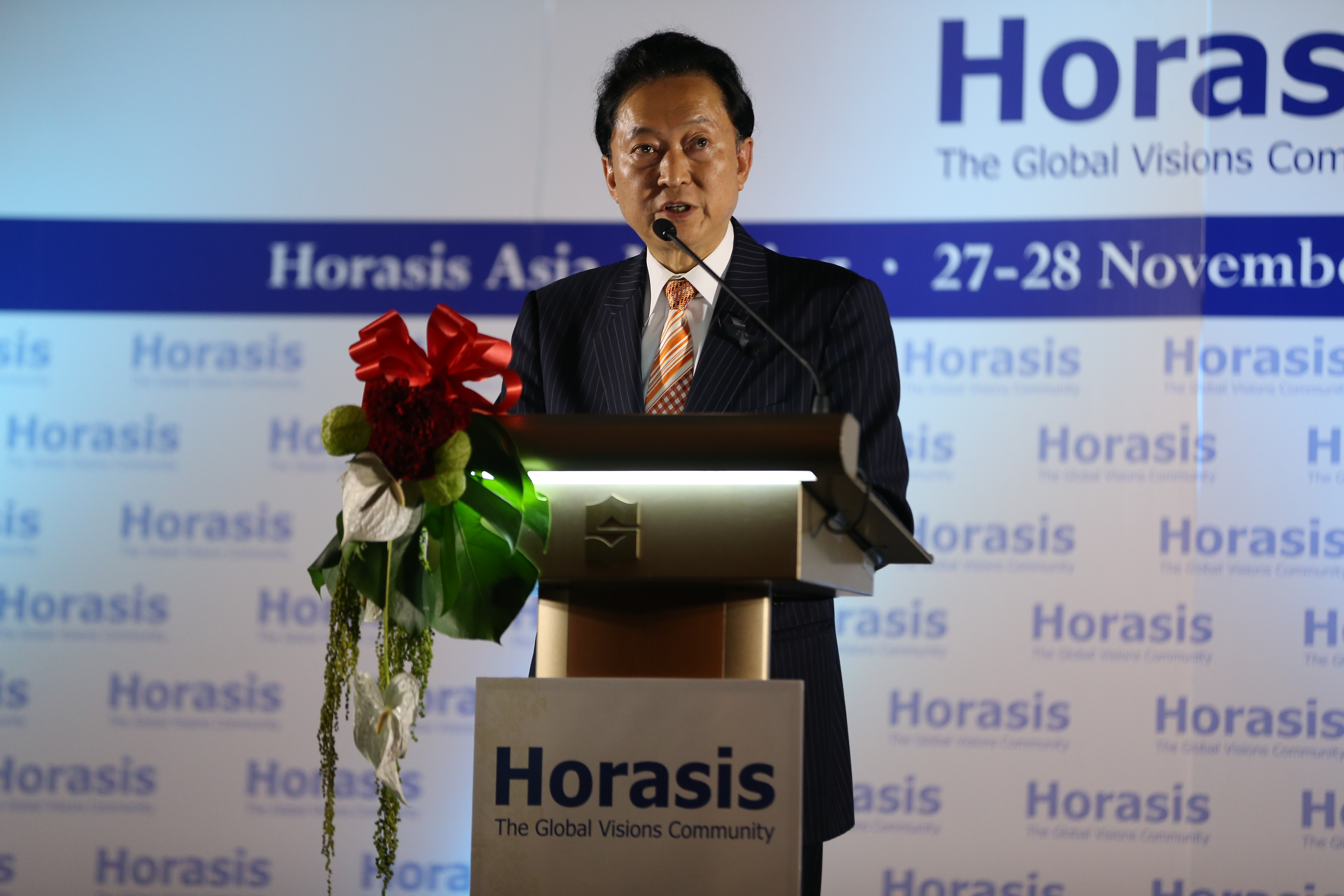 Horasis Asia Meeting 2016, Bangkok, 26-27 November